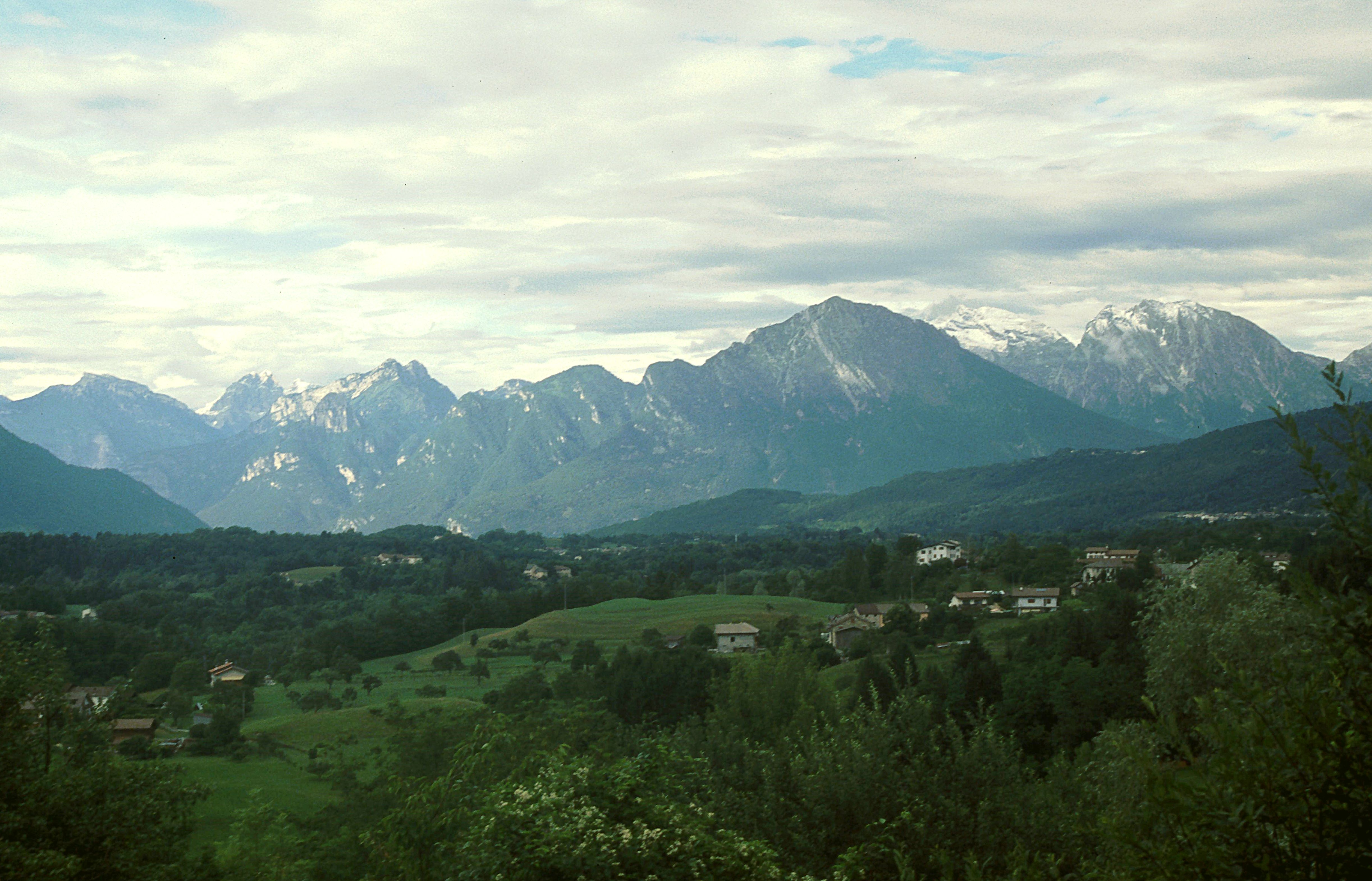 Blick vom Nevegal auf die Dolomiti Bellunesi